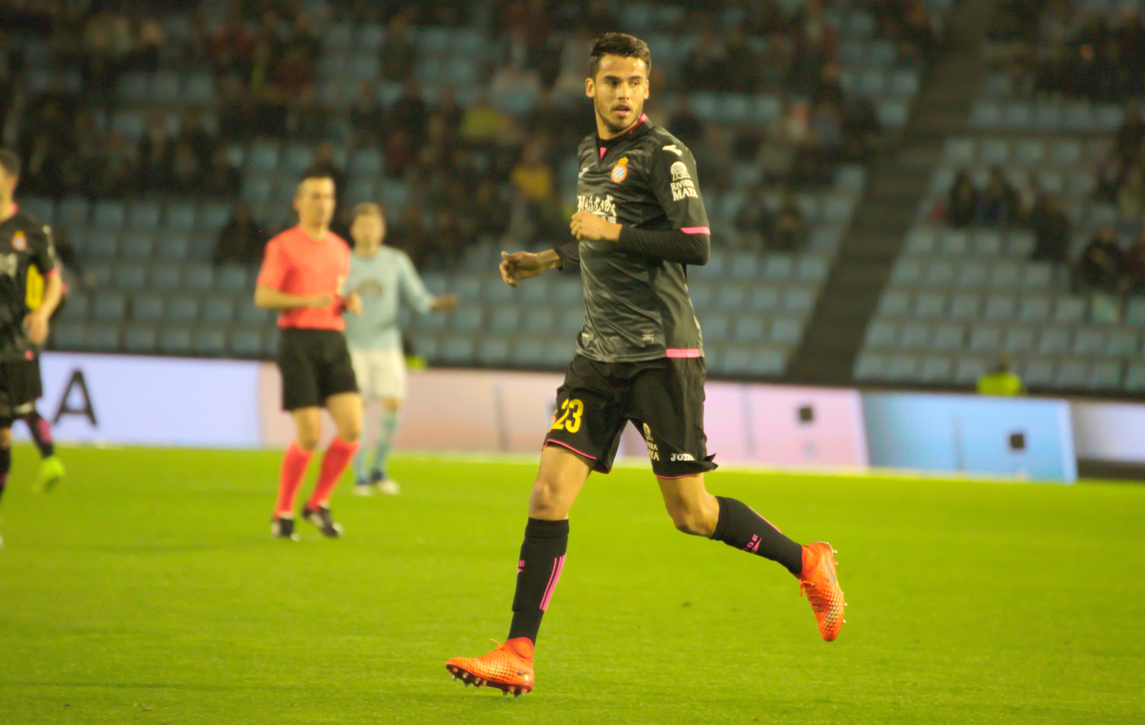 Diego Antonio Reyes Rosales - Espanyol